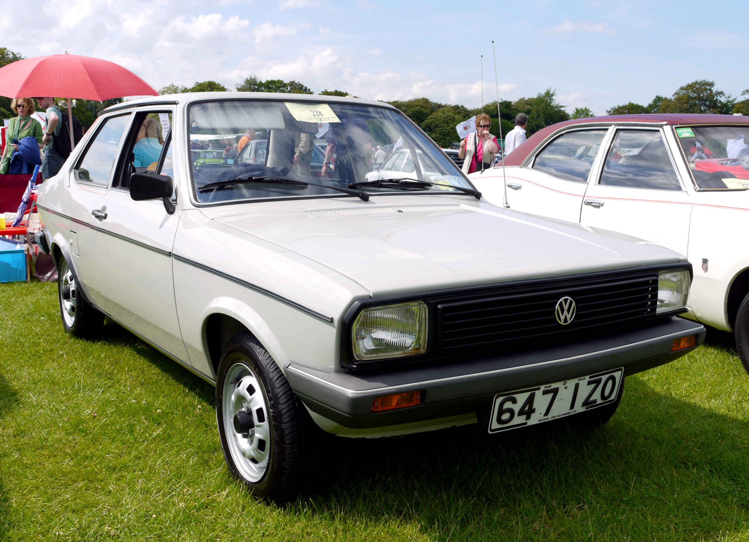 1981 Volkswagen Derby LSE.